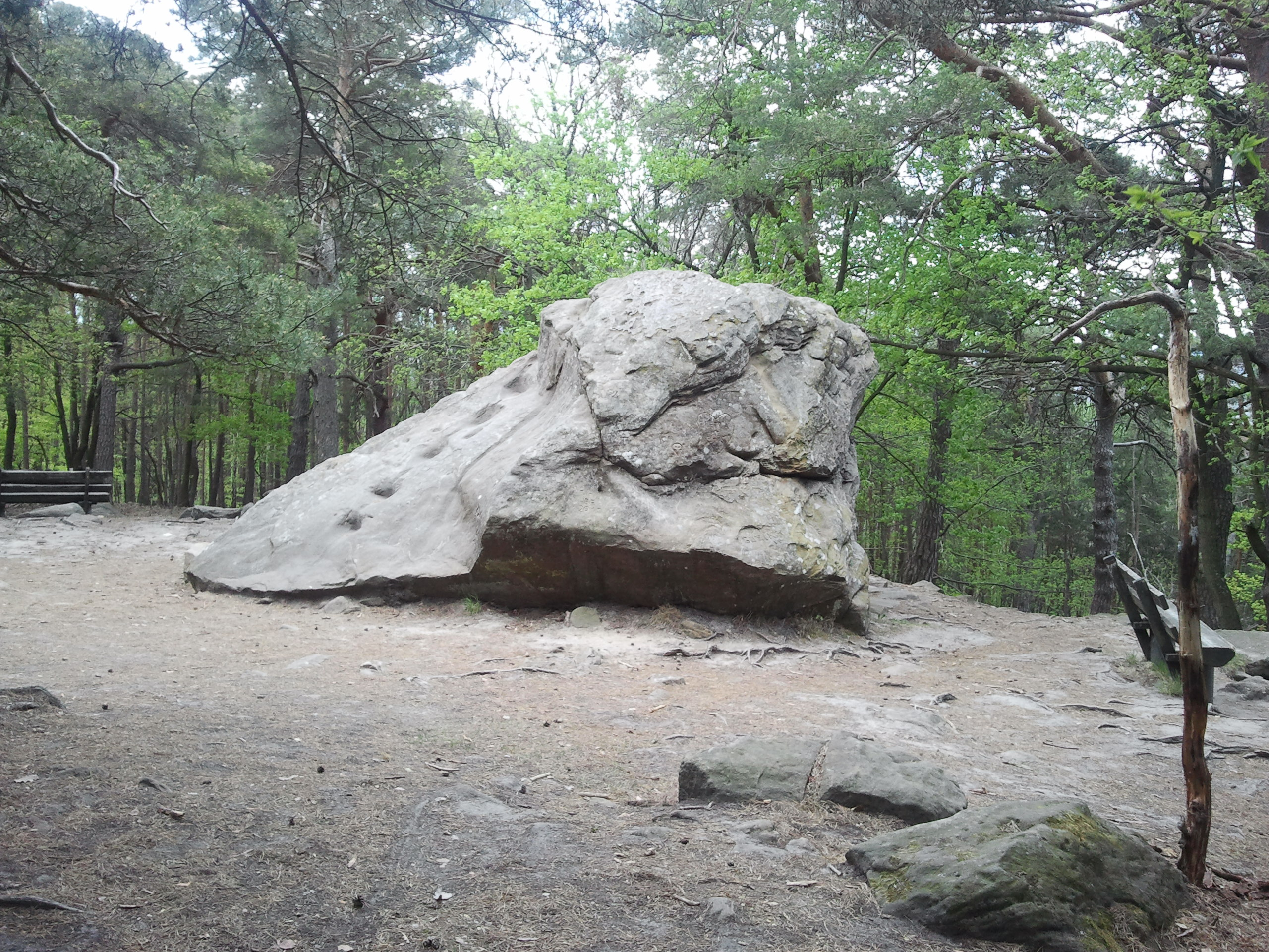 Findling auf dem Teufelsstein (Pfalz)